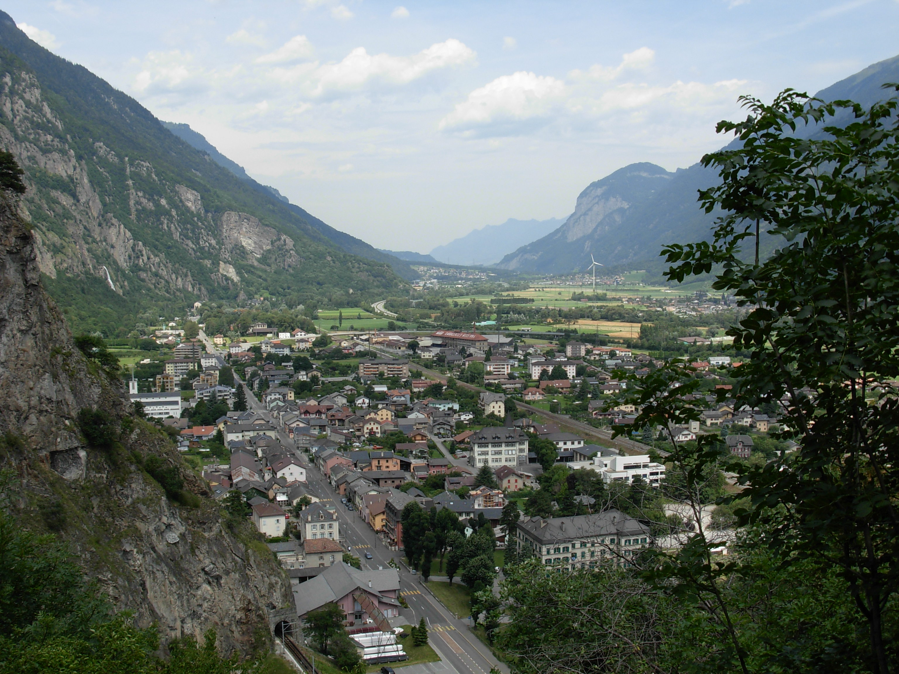 Le village de Vernayaz, vu depuis la montée vers le pont de Gueuroz. Juillet 2007.